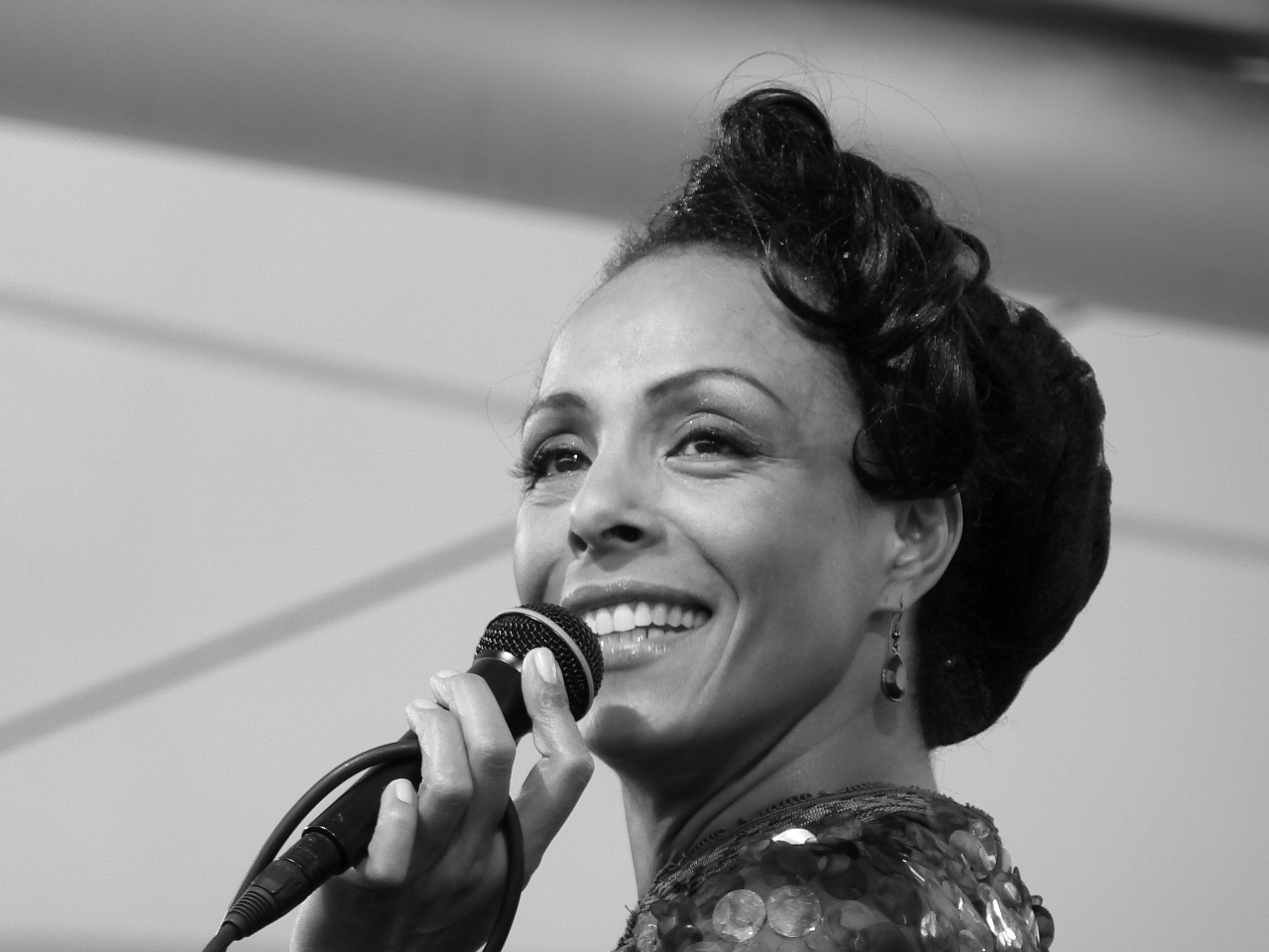 Marie Daulne en concert au Paris Jazz Festival, parc floral de Paris